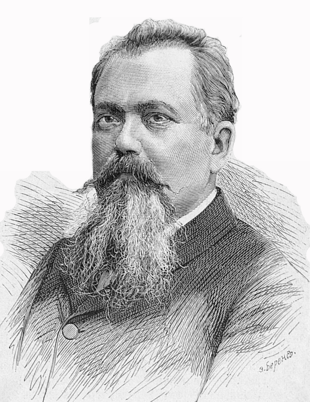 Jan Koziełł-Poklewski ps. „Jakub Skała” (ur. 1837 w Serweczu Wielkim, zm. 7 maja 1896 w Bobrujsku) – pułkownik Wojsk Polskich w powstaniu styczniowym, dowódca III Korpusu wojsk powstańczych w latach 1863-1864, komendant Warszawy.